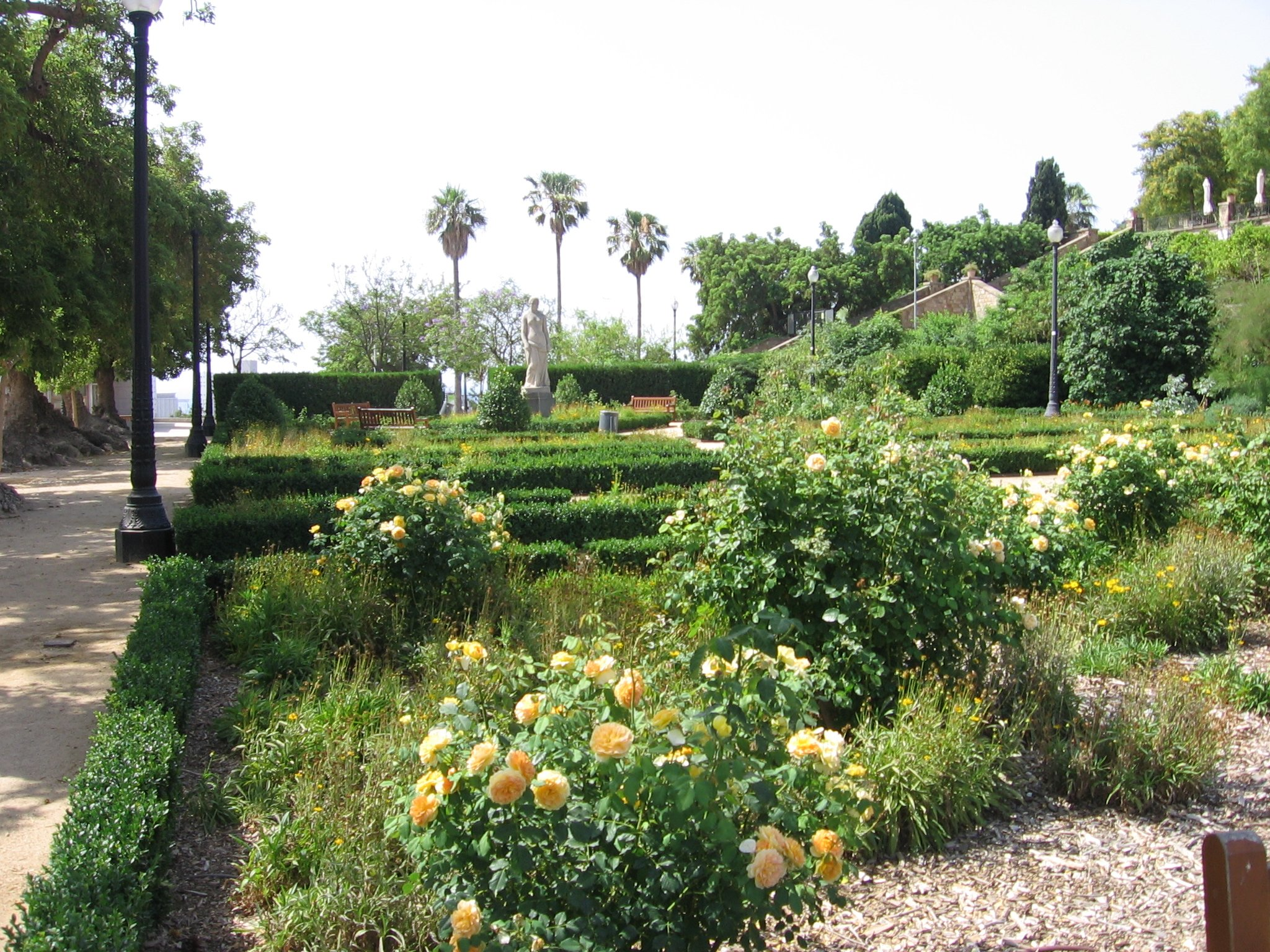 Jardines de Miramar, Montjuïc, Barcelona.